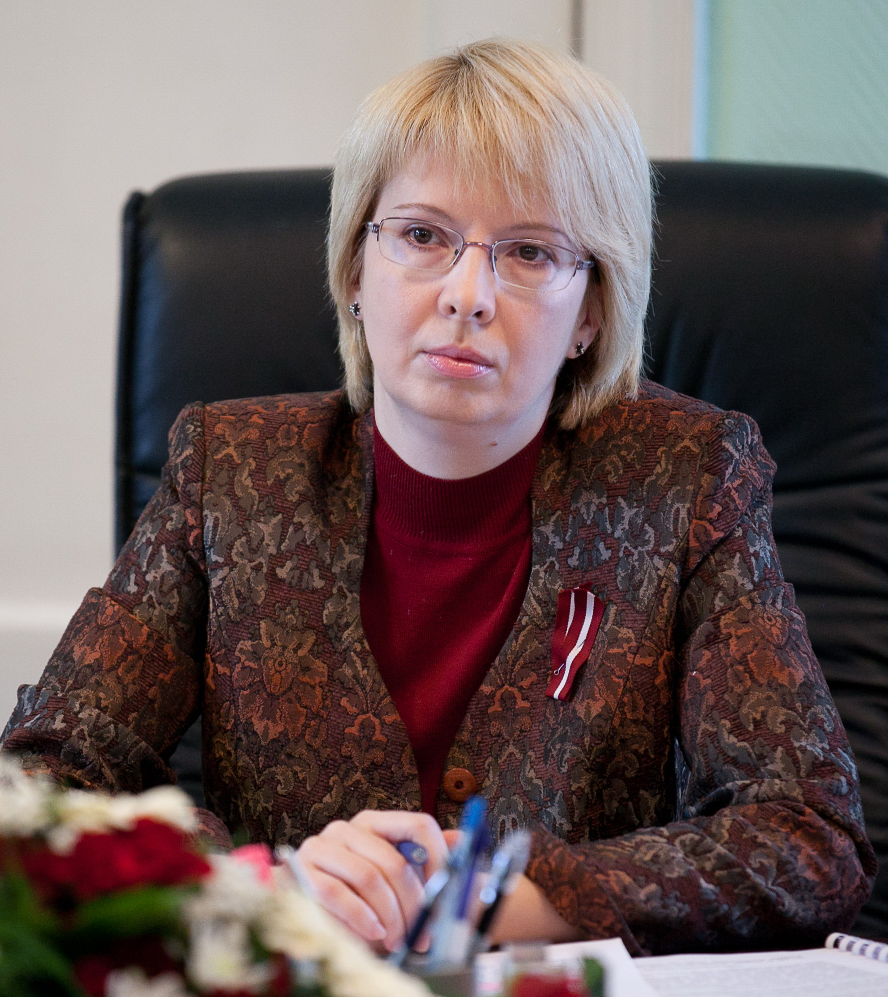 Ināra Mūrniece 2011.gada 15.novembrī